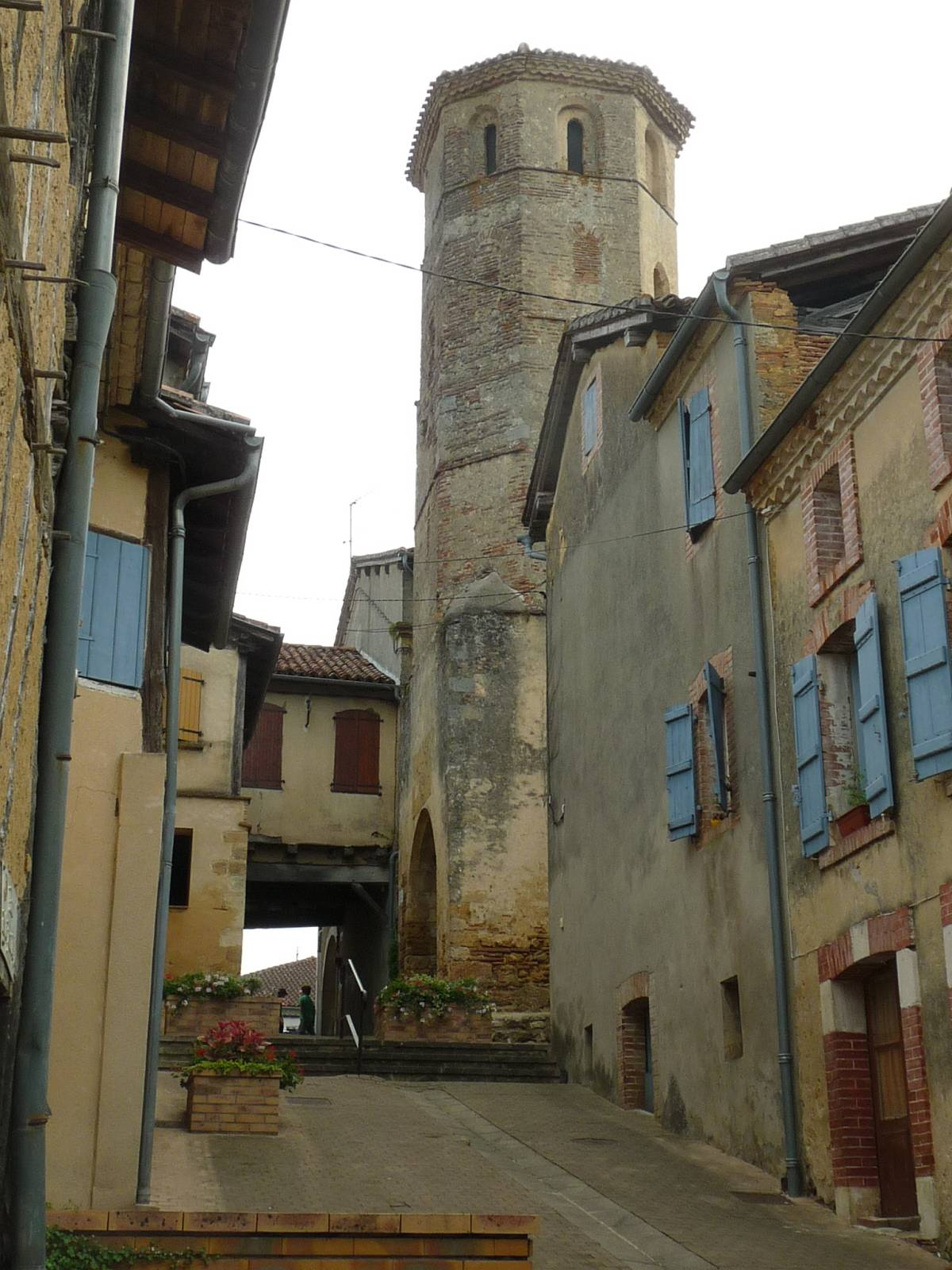 ancienne église St-Jean-Baptiste vue de la porte d'Uzan, Cazaubon, Gers, France